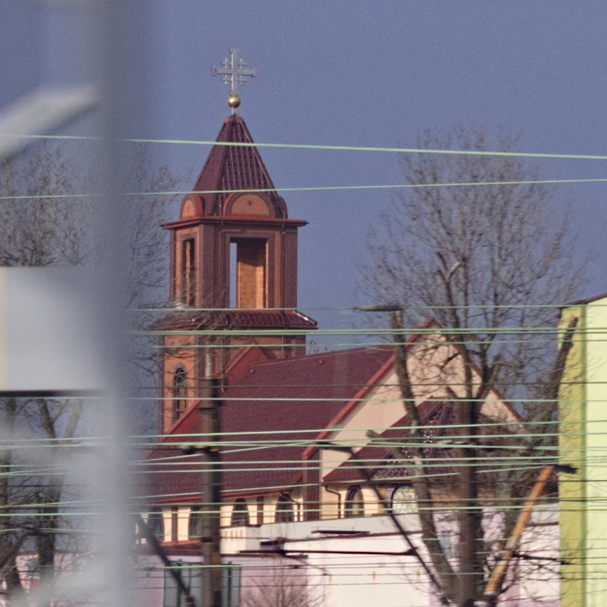 kościół św. Maksymiliana Kolbego w Łazach, widok z pociągu PKP Intercity Morcinek, jadącego do Lublina